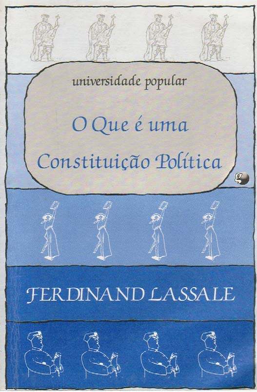 Capa do livro O que é uma Constituição Política de Ferdinand Lassalle.